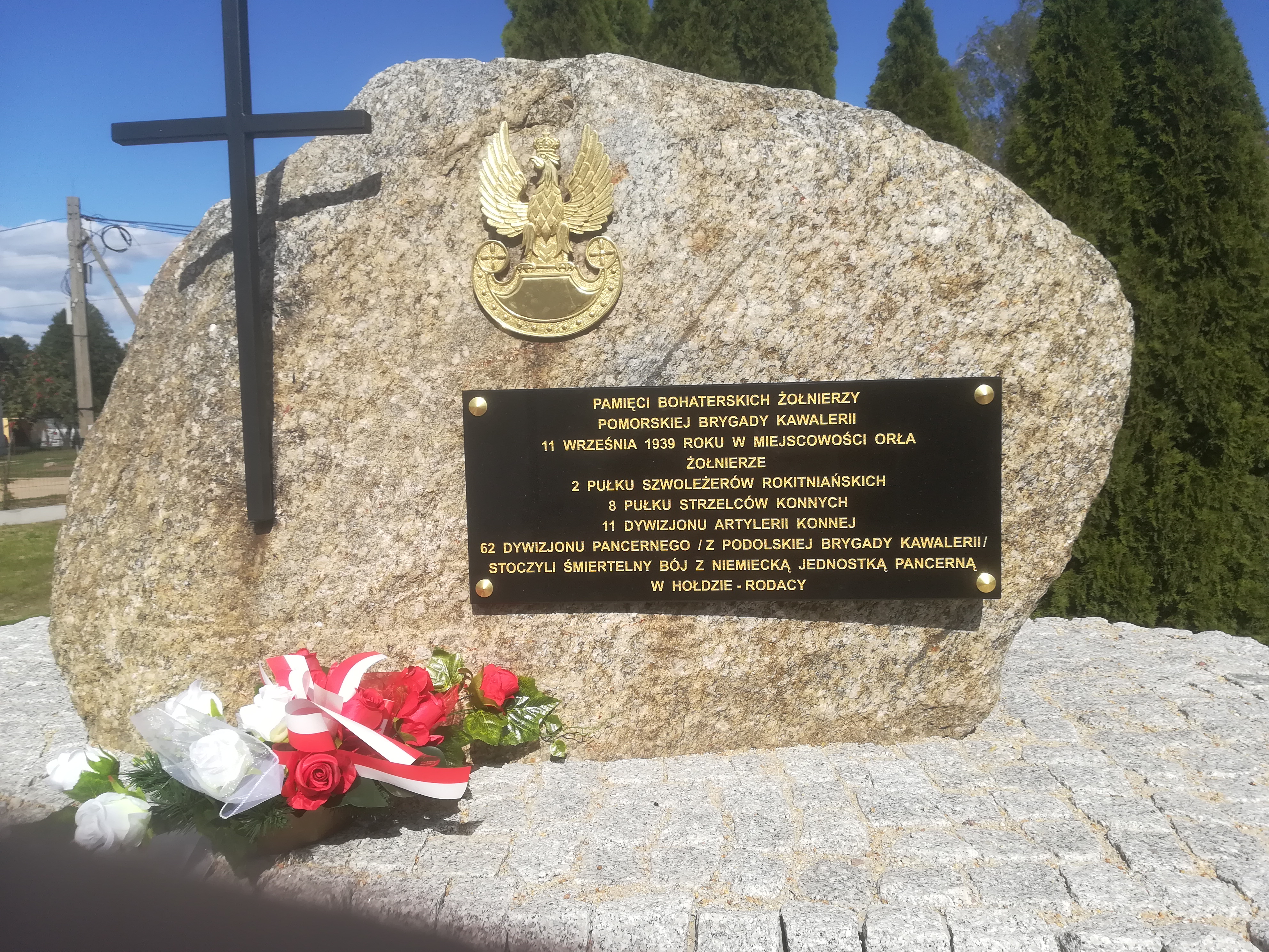 Obelisk 2019 - przebudowany z nową tablicą